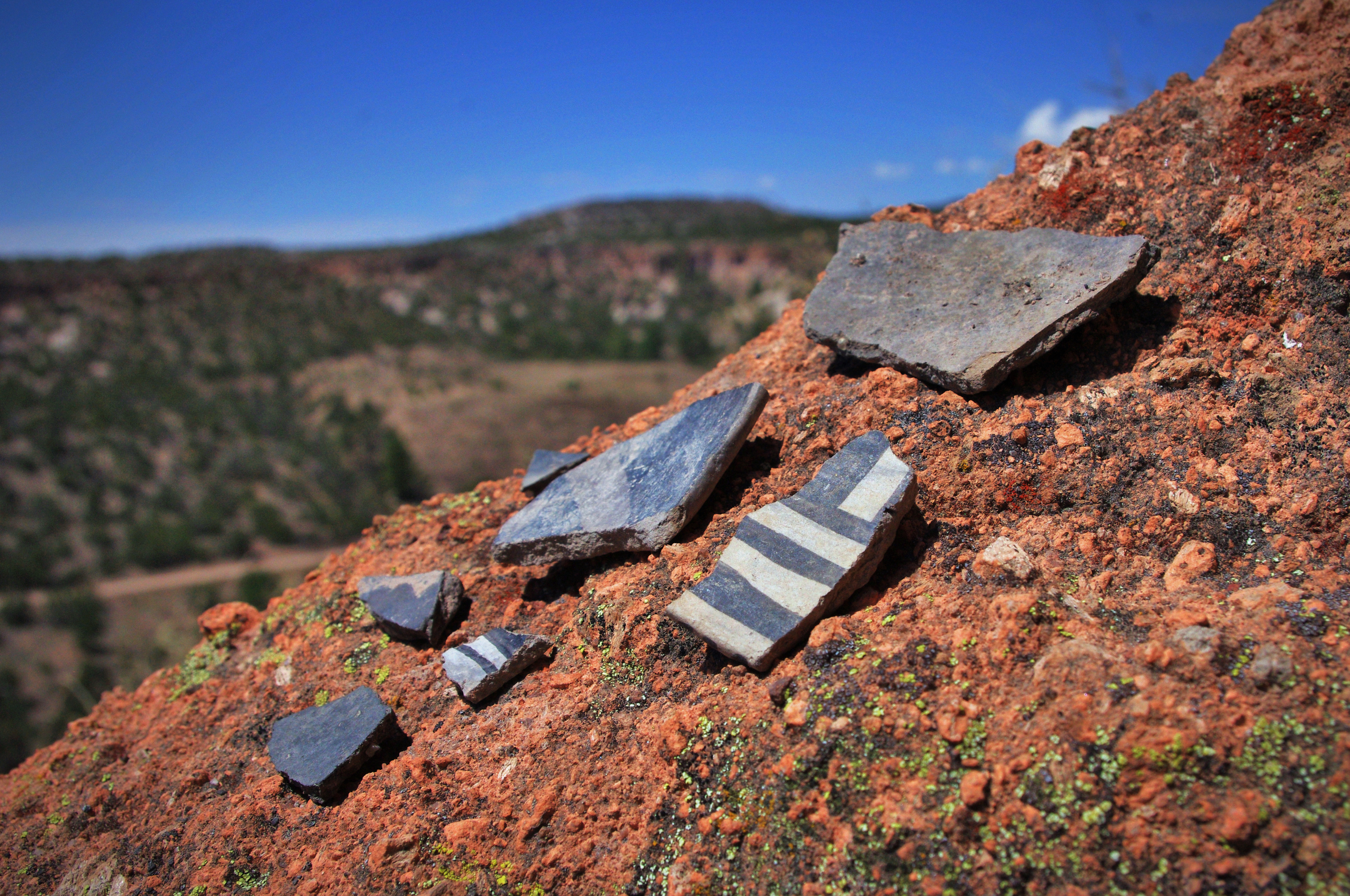 Video here